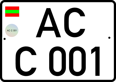 Прицепной номер Приднестровья